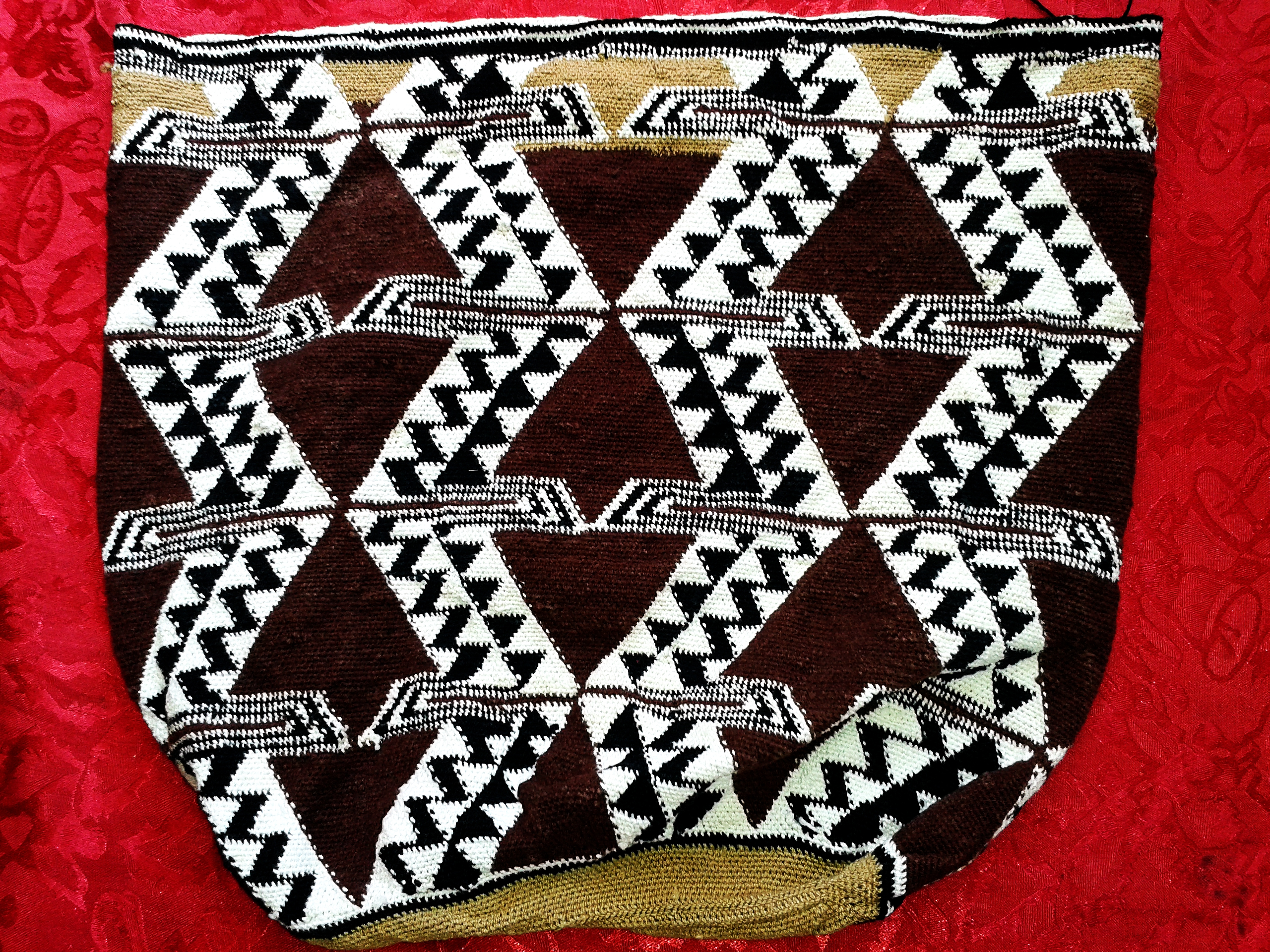 Consta de trazos hechos con hilos o fibras naturales con diseños.